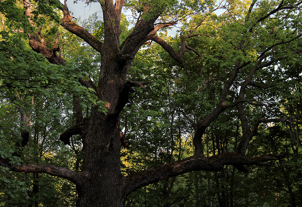 Дуб Гузовского: Ильинское участковое лесничество,Моргаушский район, рядом с д. Ильинка This image is related to the protected area of Russia number 2110181